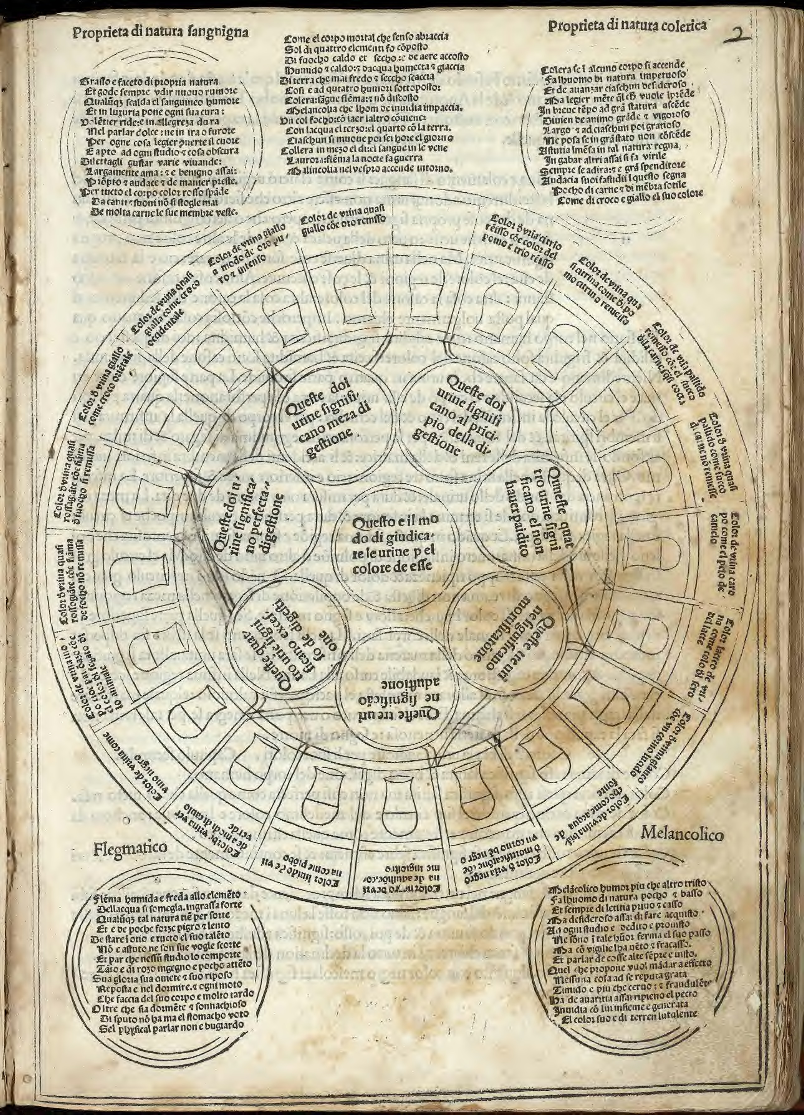 Fasciculus medicinae (italiano). - In Venexia : Stampato per Zuane & Gregorio di Gregorii, nel MCCCCLXXXXIII adi Y Februario